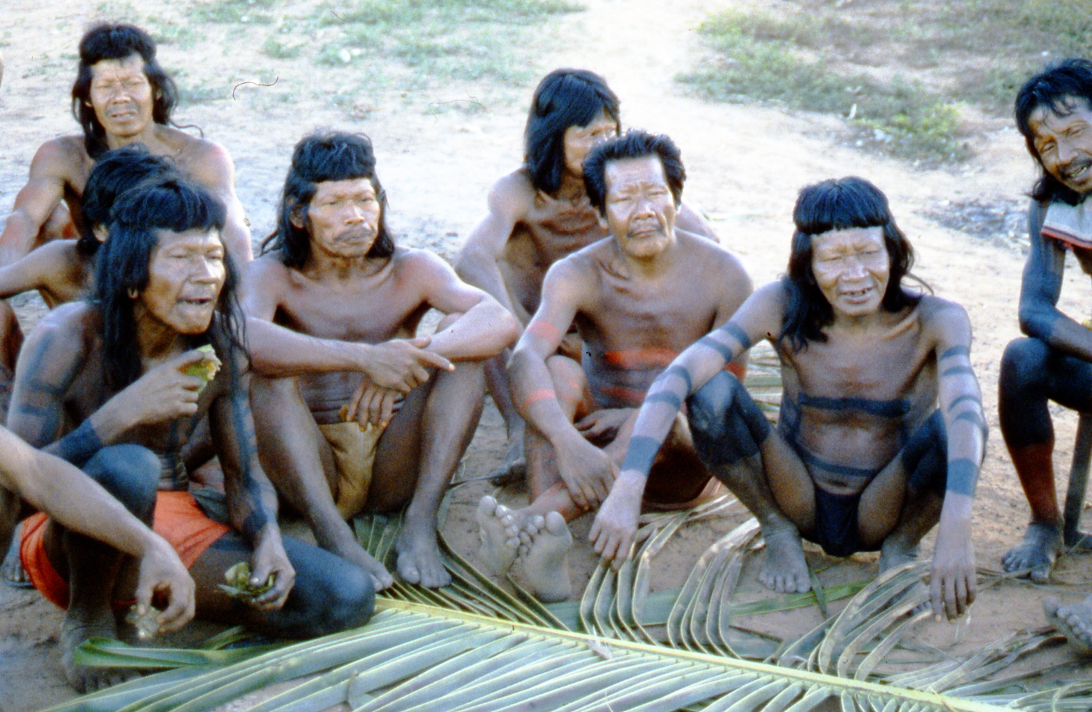 Ratsversammlung